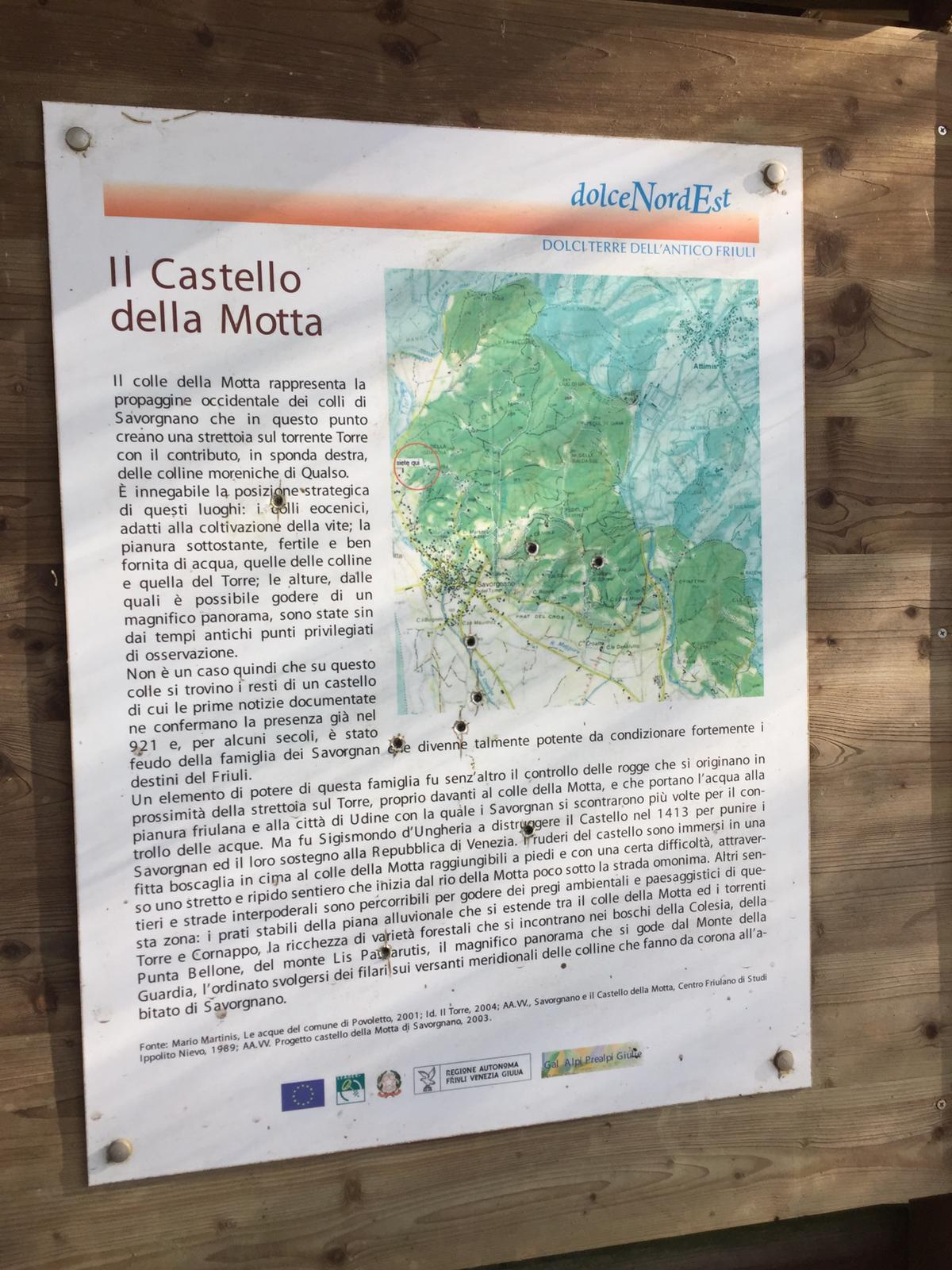 Segnaletica Castello della Motta